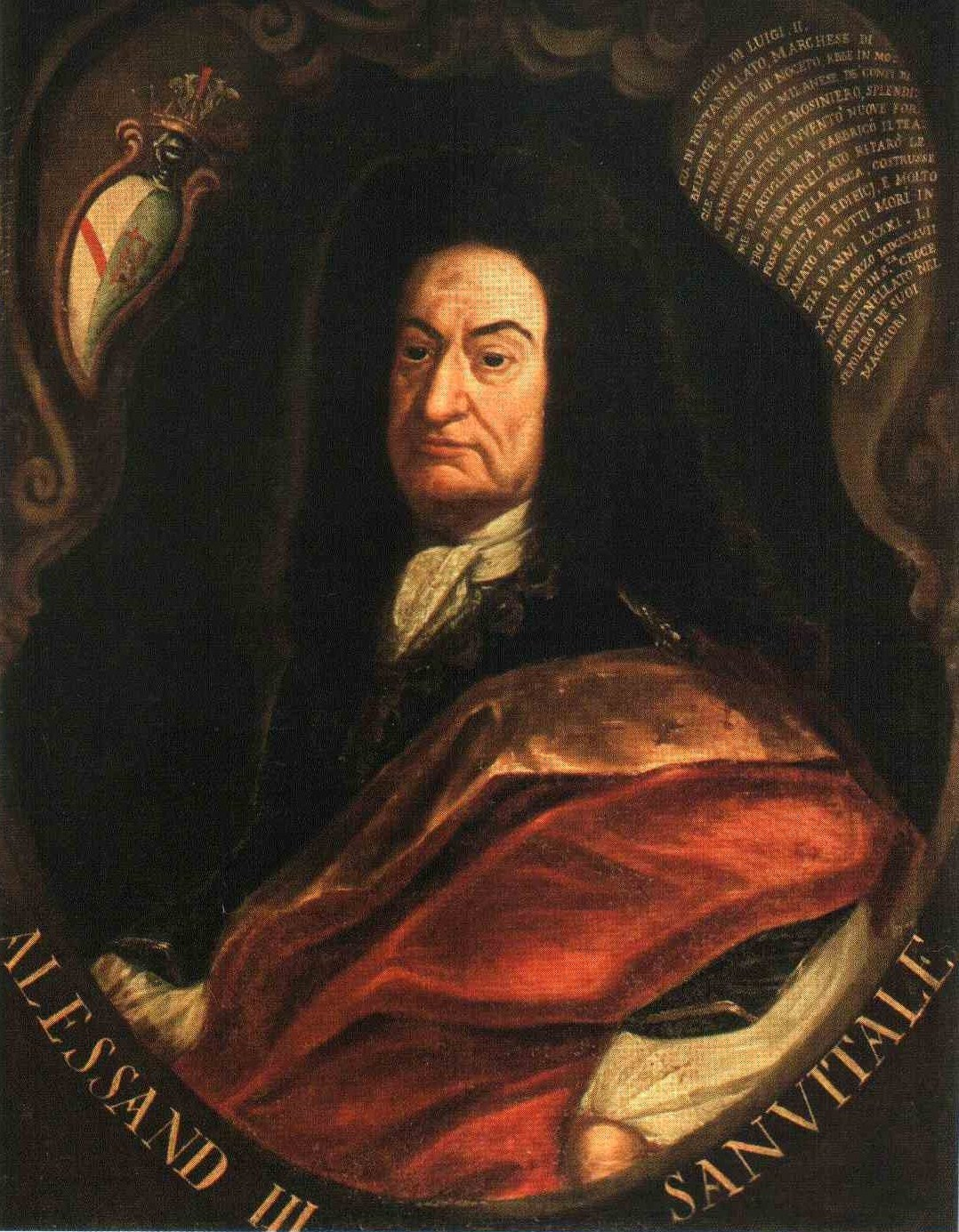 Il conte Alessandro III Sanvitale (Parma, 1645-1727).